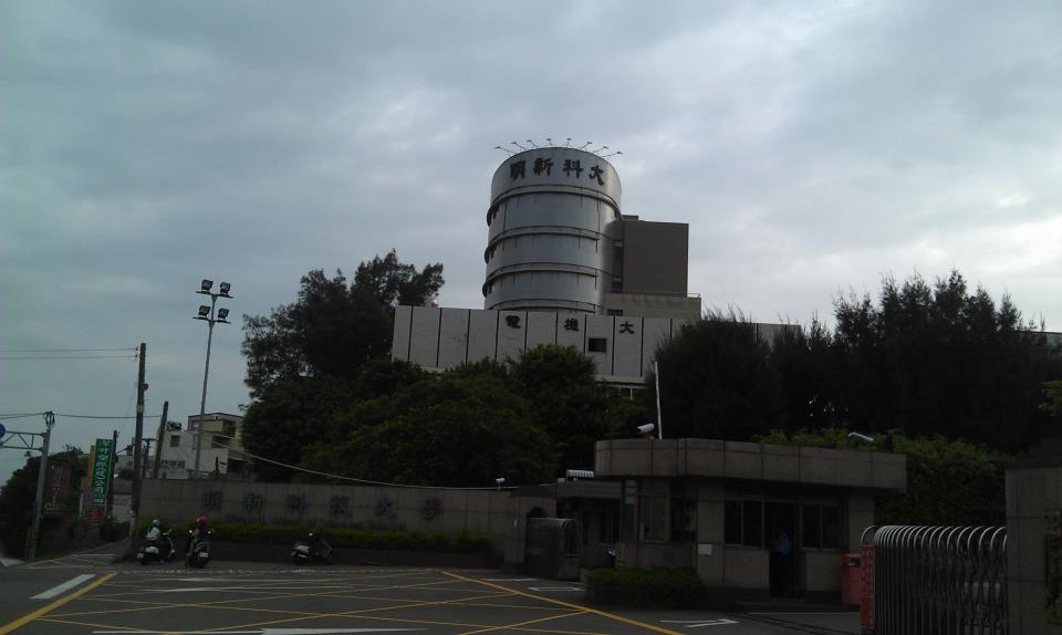 中文（台灣）: 校門外一景(管理學院。)